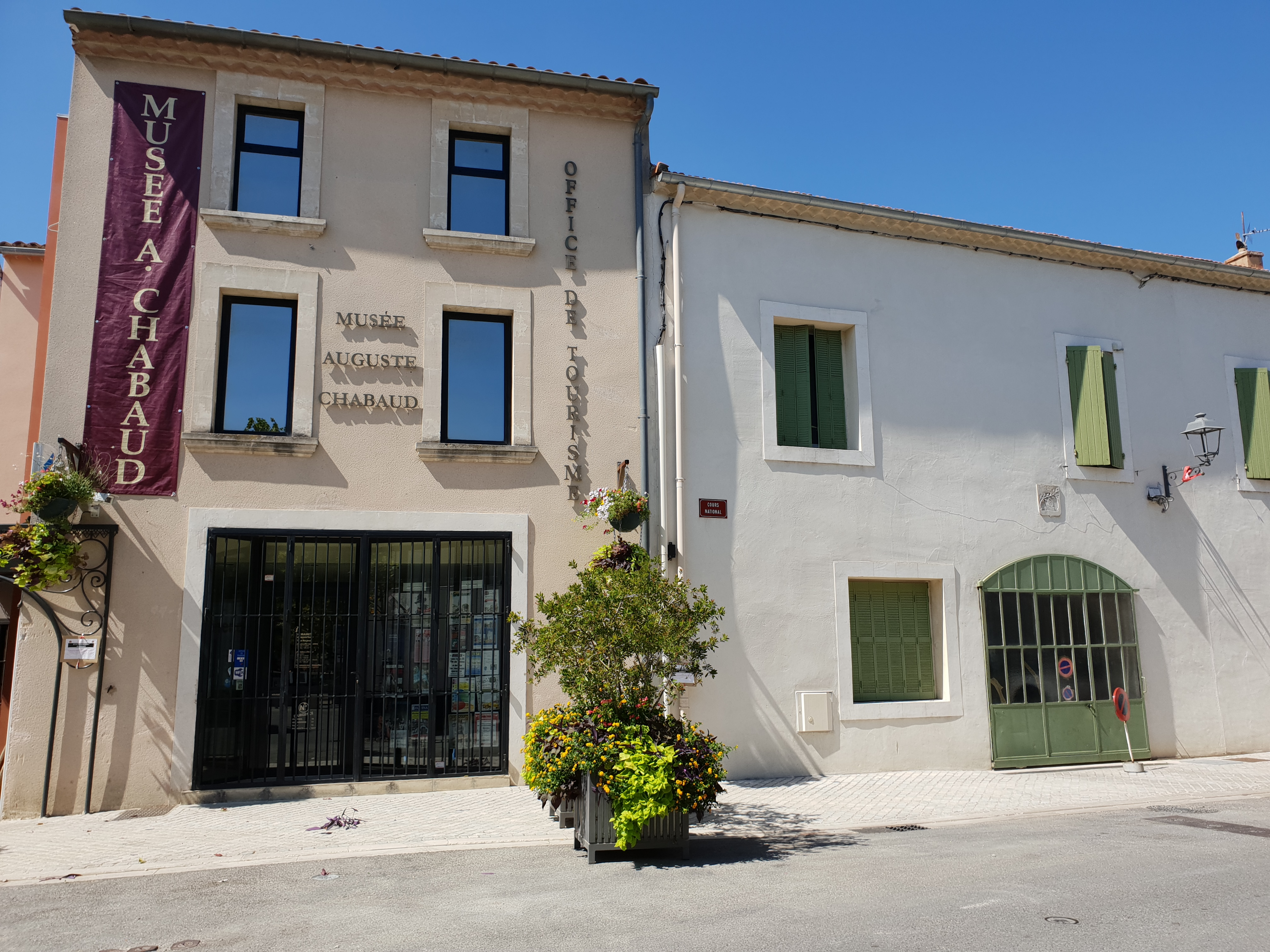 L'ancien moulin à farine abrite désormais le musée Auguste Chabaud.